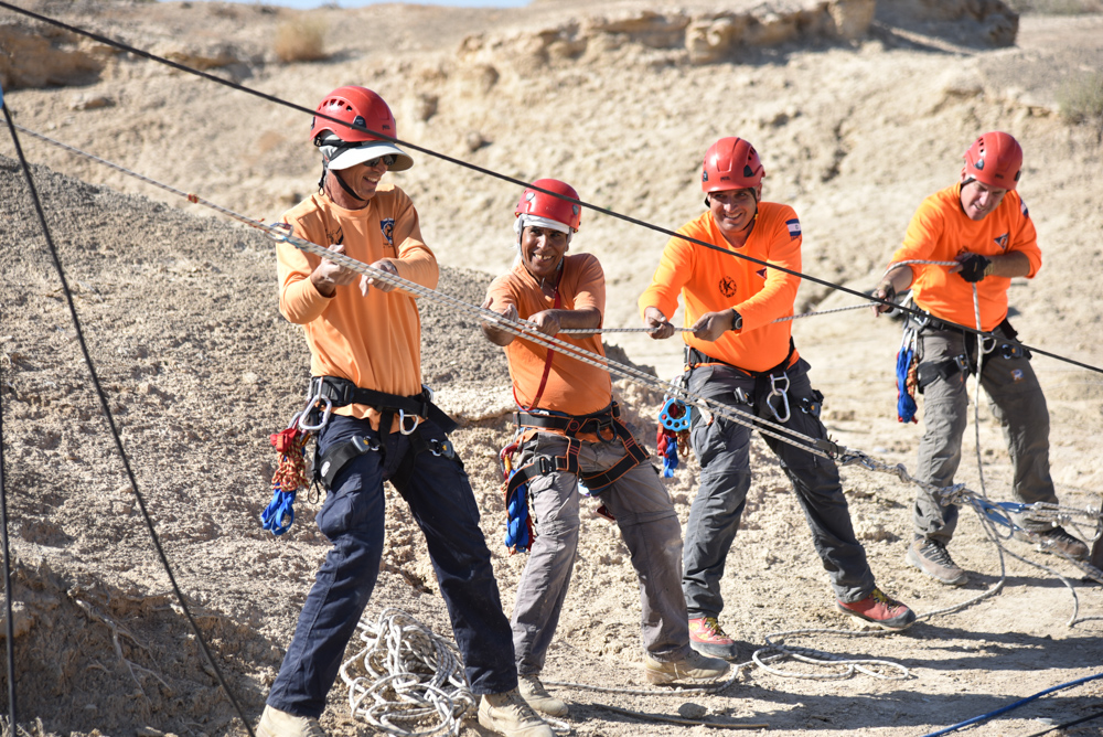 רענון טגח יחידת חילוץ מגילות ים המלח